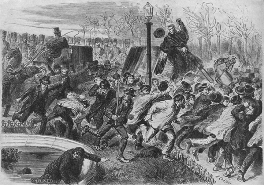 Obsèques de Victor Noir 1870